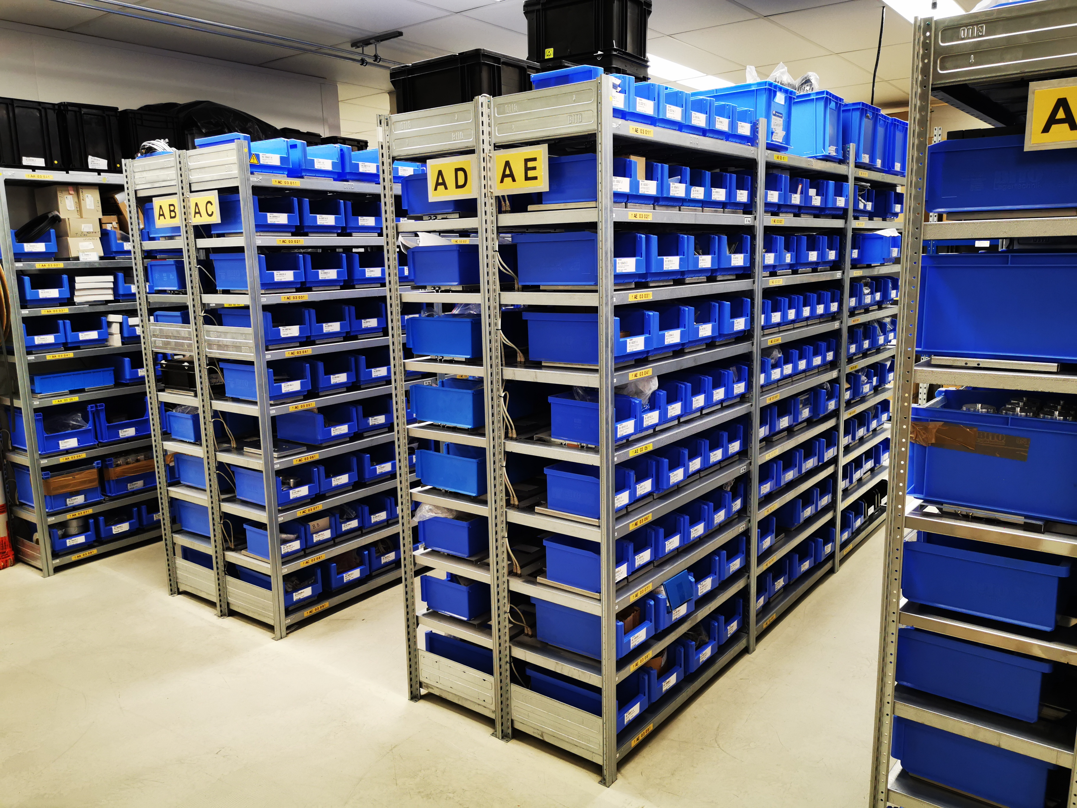 Regallager mit Boxen auf je einer Waage